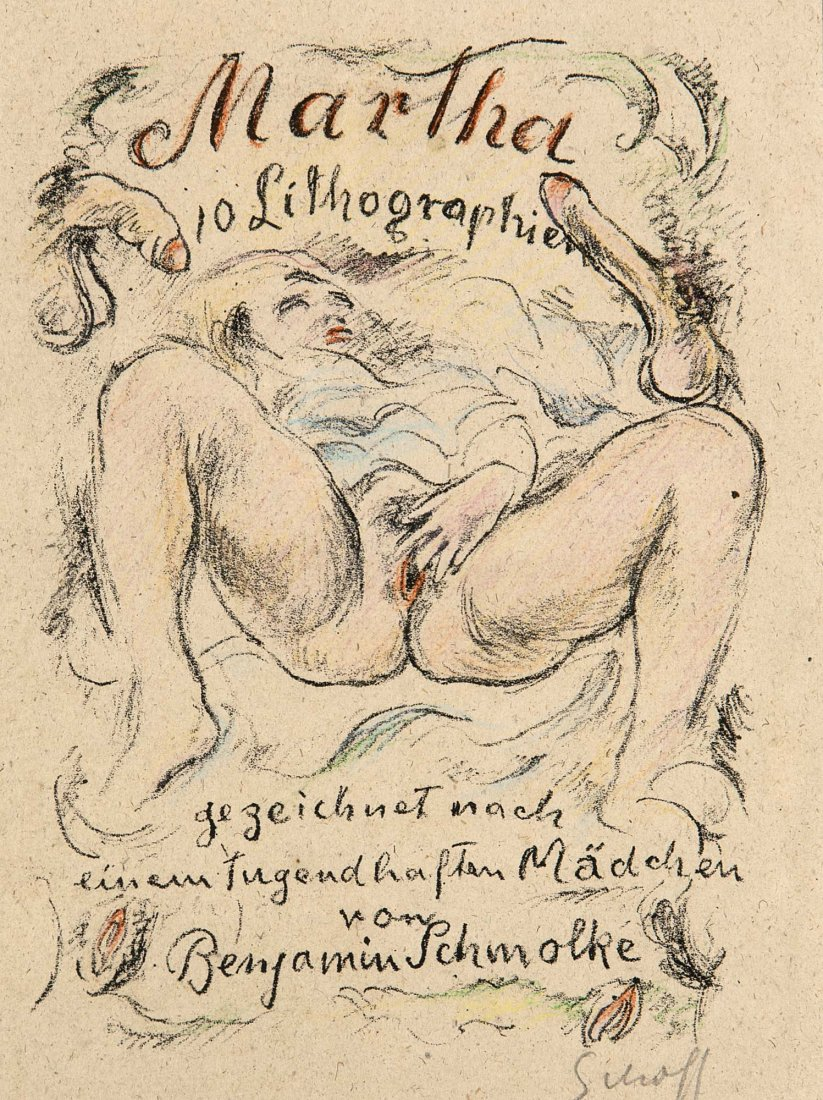 Otto Schoff: Martha. 10 farbige Lithographien von B. Schmolke für Freunde in 20 Exemplaren. O.O., Dr. u. J., ca. 1920. 10 Taf. unter Passepartout in OLwd.-Mappe mit Deckelschild. Eins von 3 handkolor. Exemplaren (ges. 20).